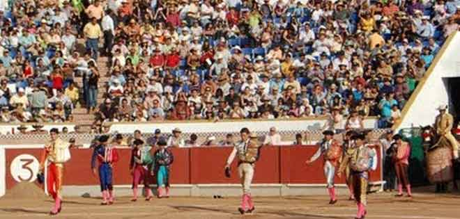 Plaza Monumental de Toros de Pueblo Nuevo